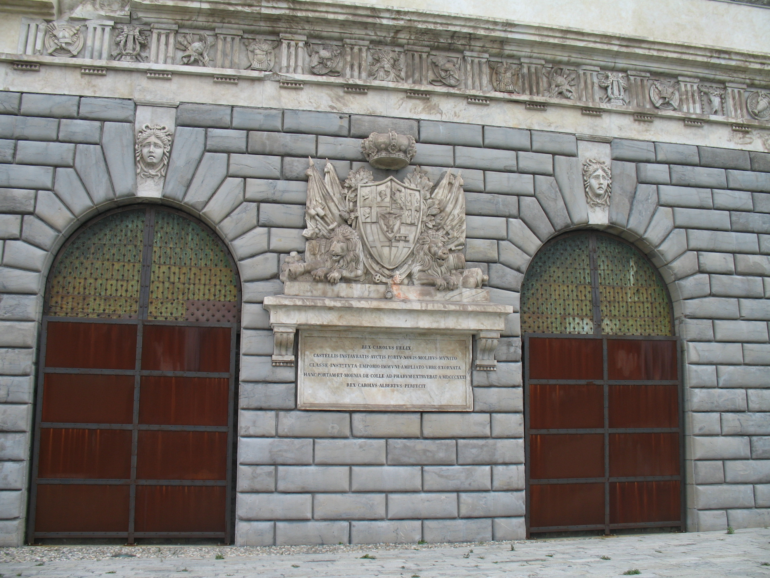 Immagine dalla Lanterna di Genova (passeggiata, fortificazioni, museo della Lanterna) Lanterna - Mura - Porta Nuova